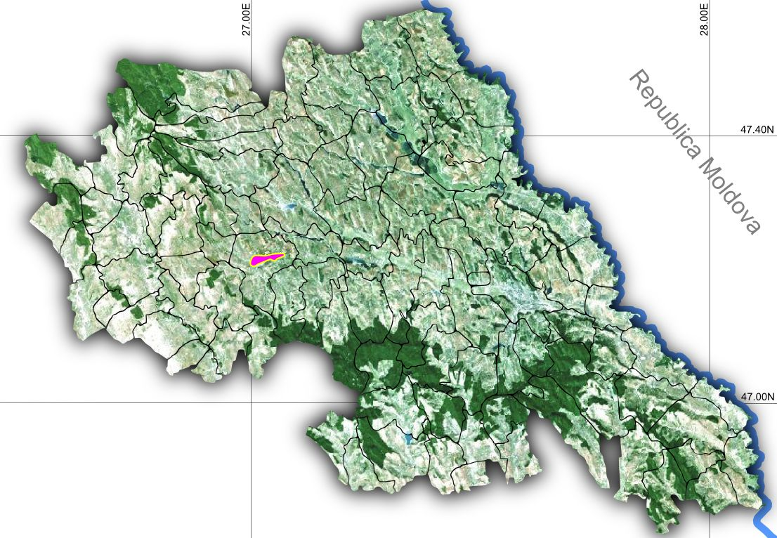 Targu Frumos jud Iasi.